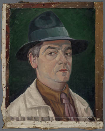 Zelfportret - Collectie Joods Historisch Museum